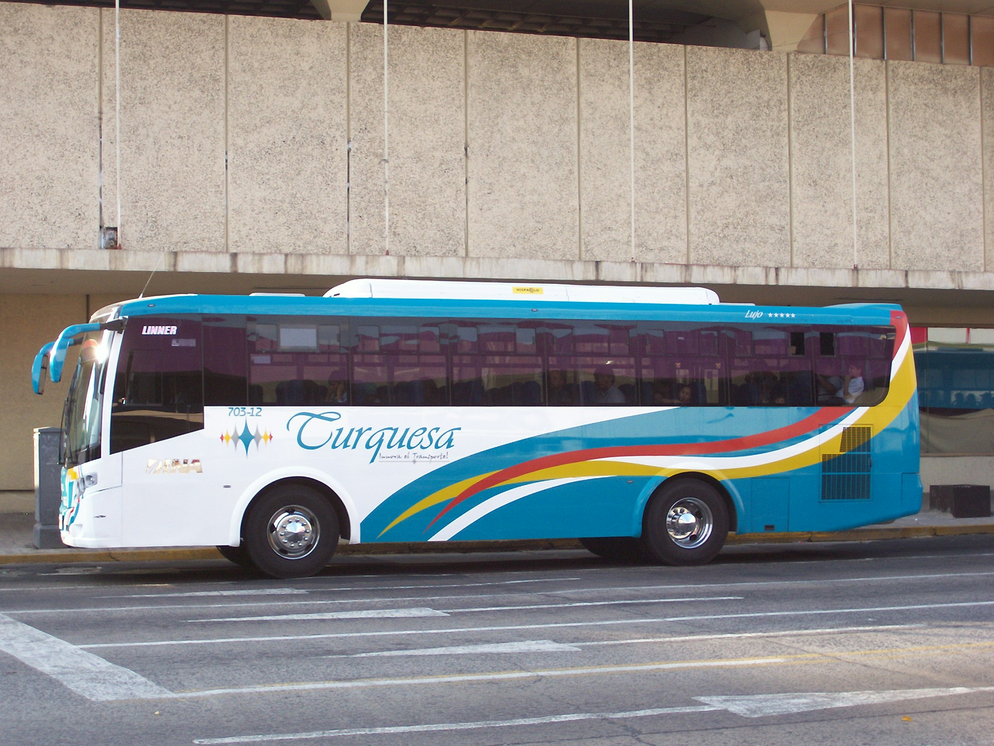 autobus de Lujo Linea Turquesa 2011